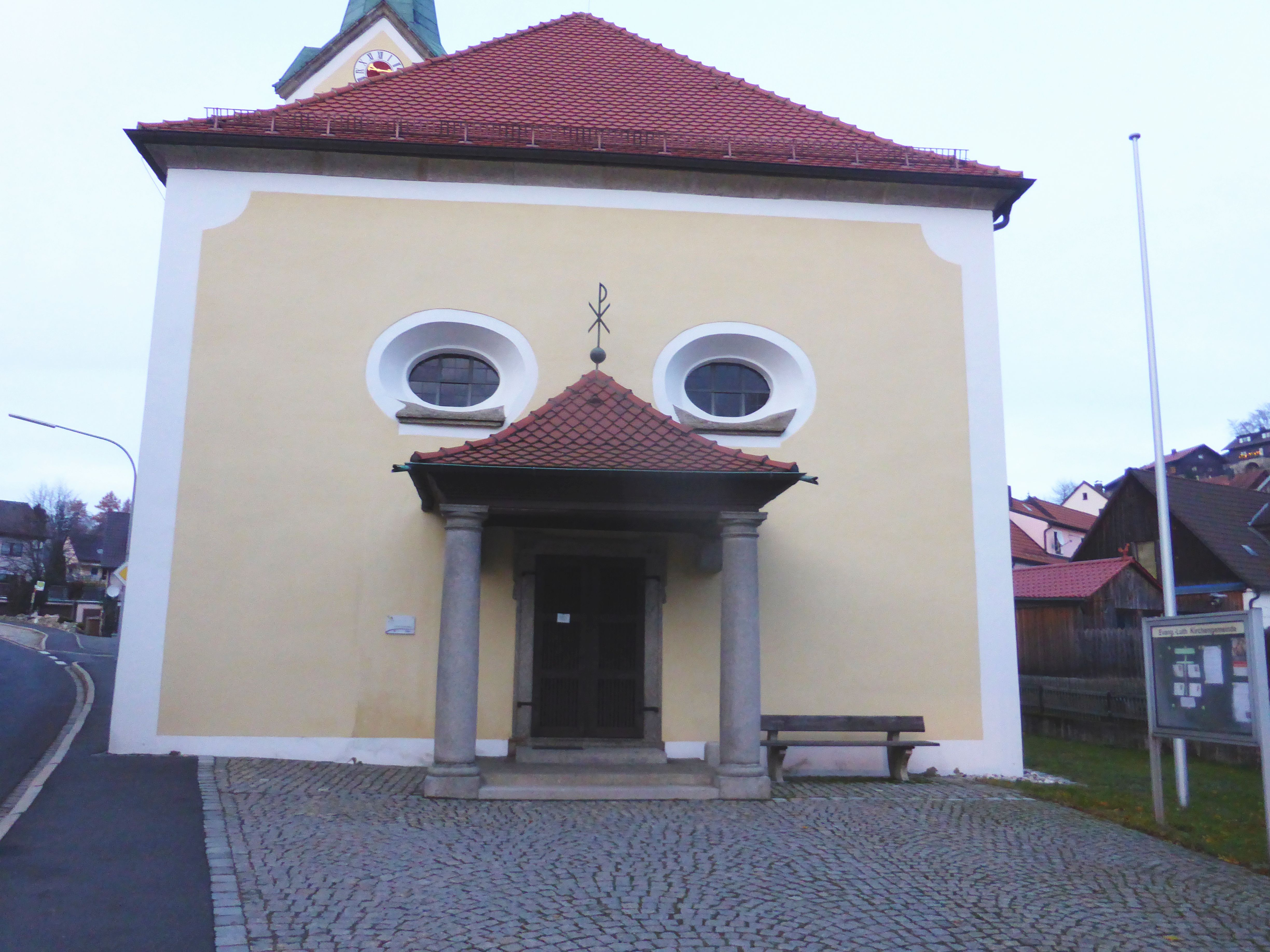 Evangelisch-lutherische Pfarrkirche St. Pankratius (Flossenbürg)